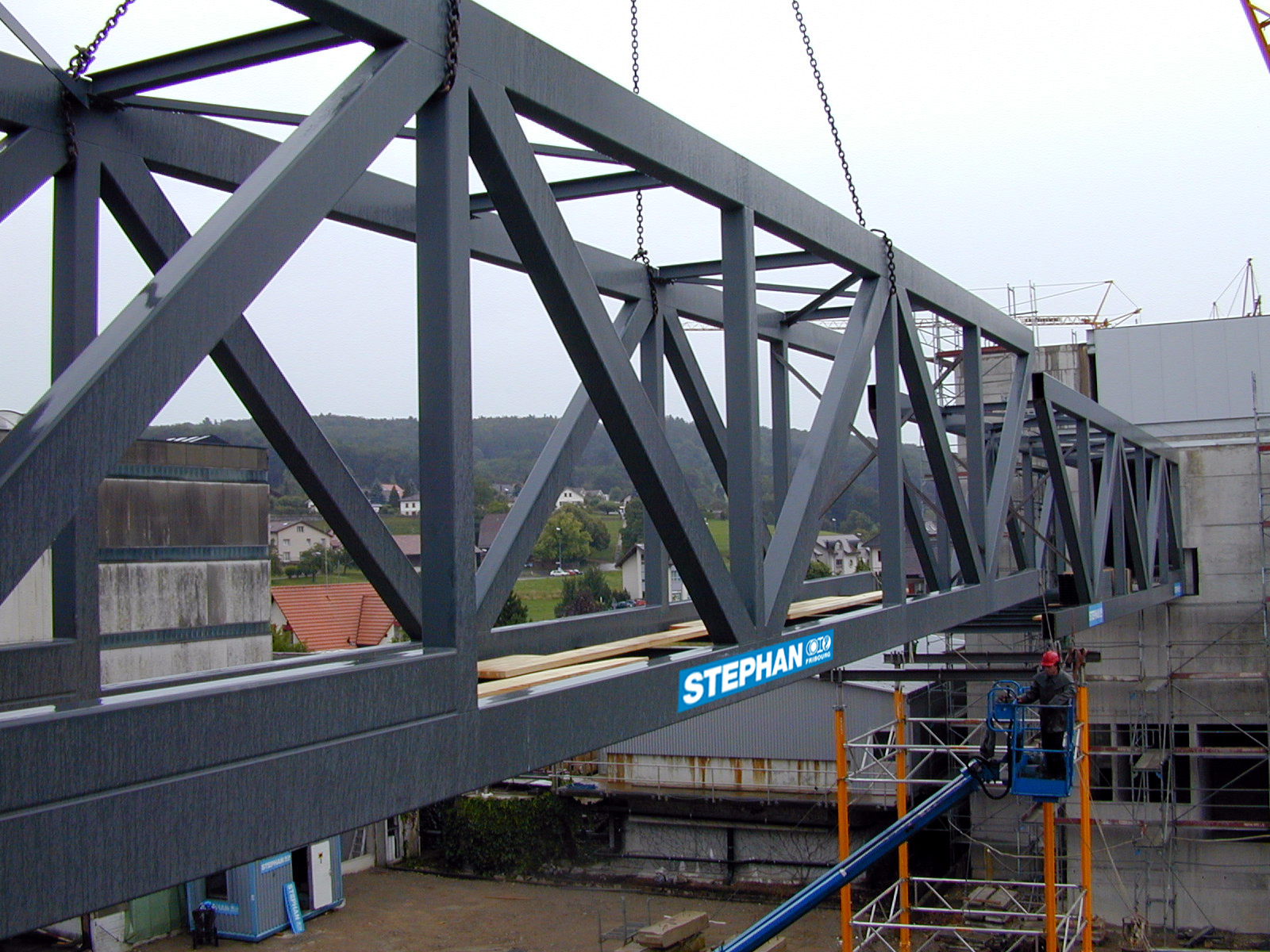 Passerelle piétonnière entre 2 bâtiments